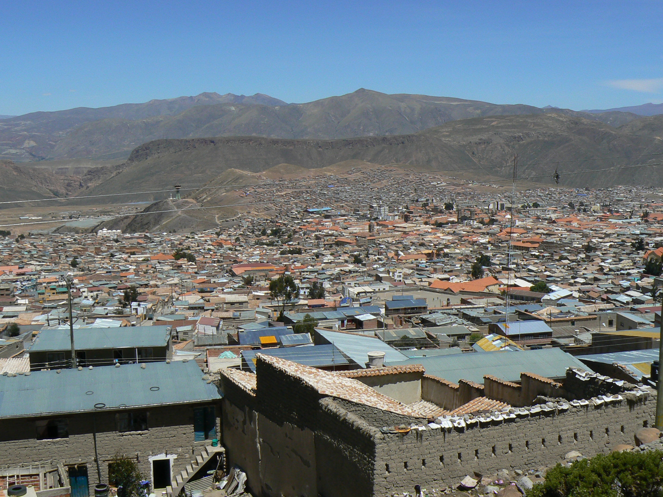 Miesto panorama.